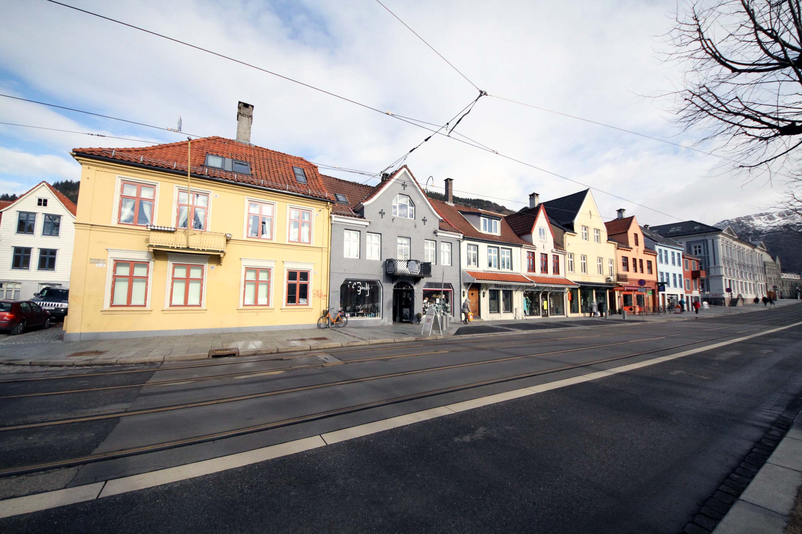 Kaigaten